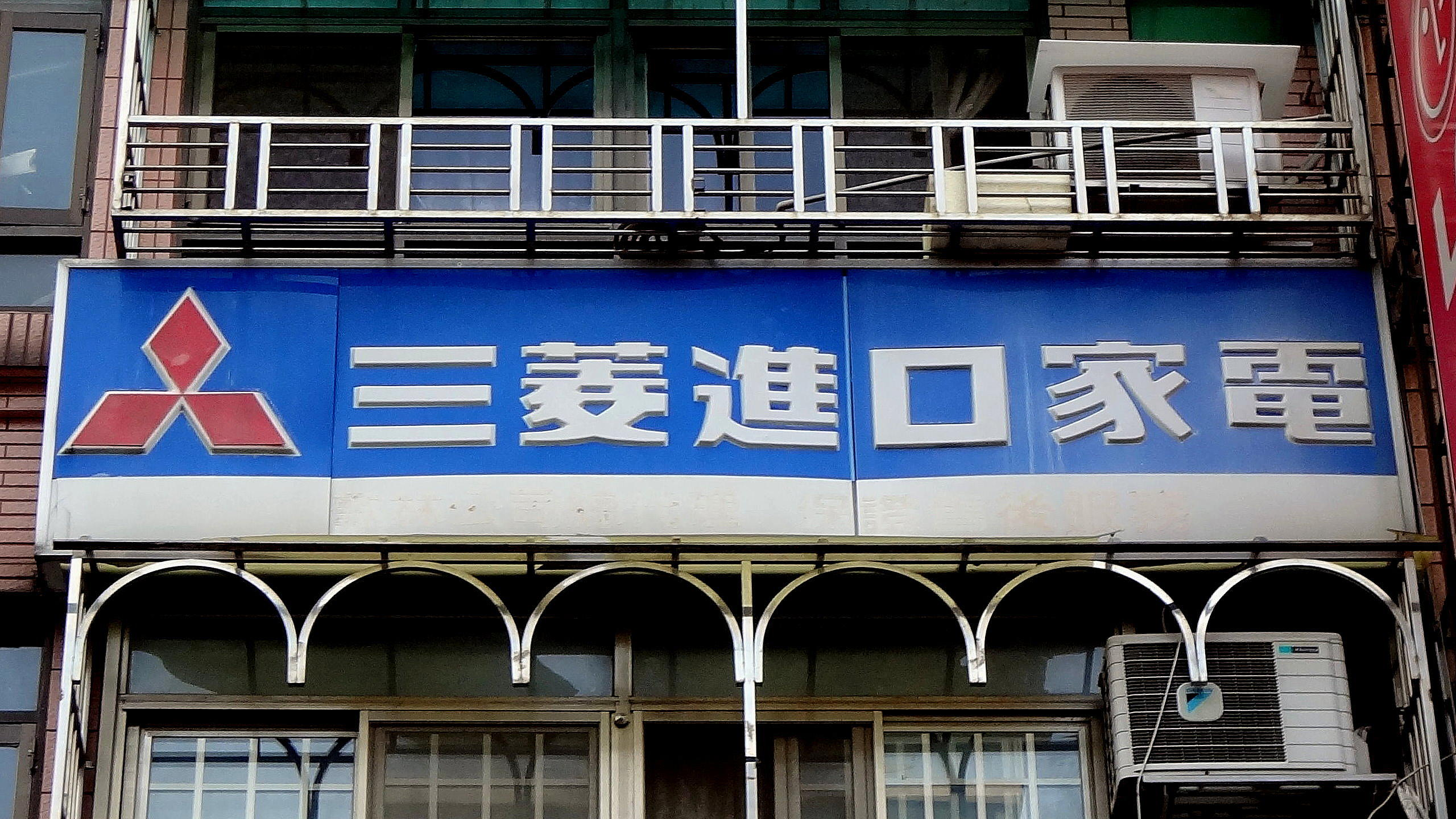 中文（台灣）: 新北市三峽區民權街某大樓外牆，1990年代歌林公司三菱進口家電經銷店橫式招牌。「三菱進口家電」六字下方標示「歌林公司總代理 保證售後服務」。